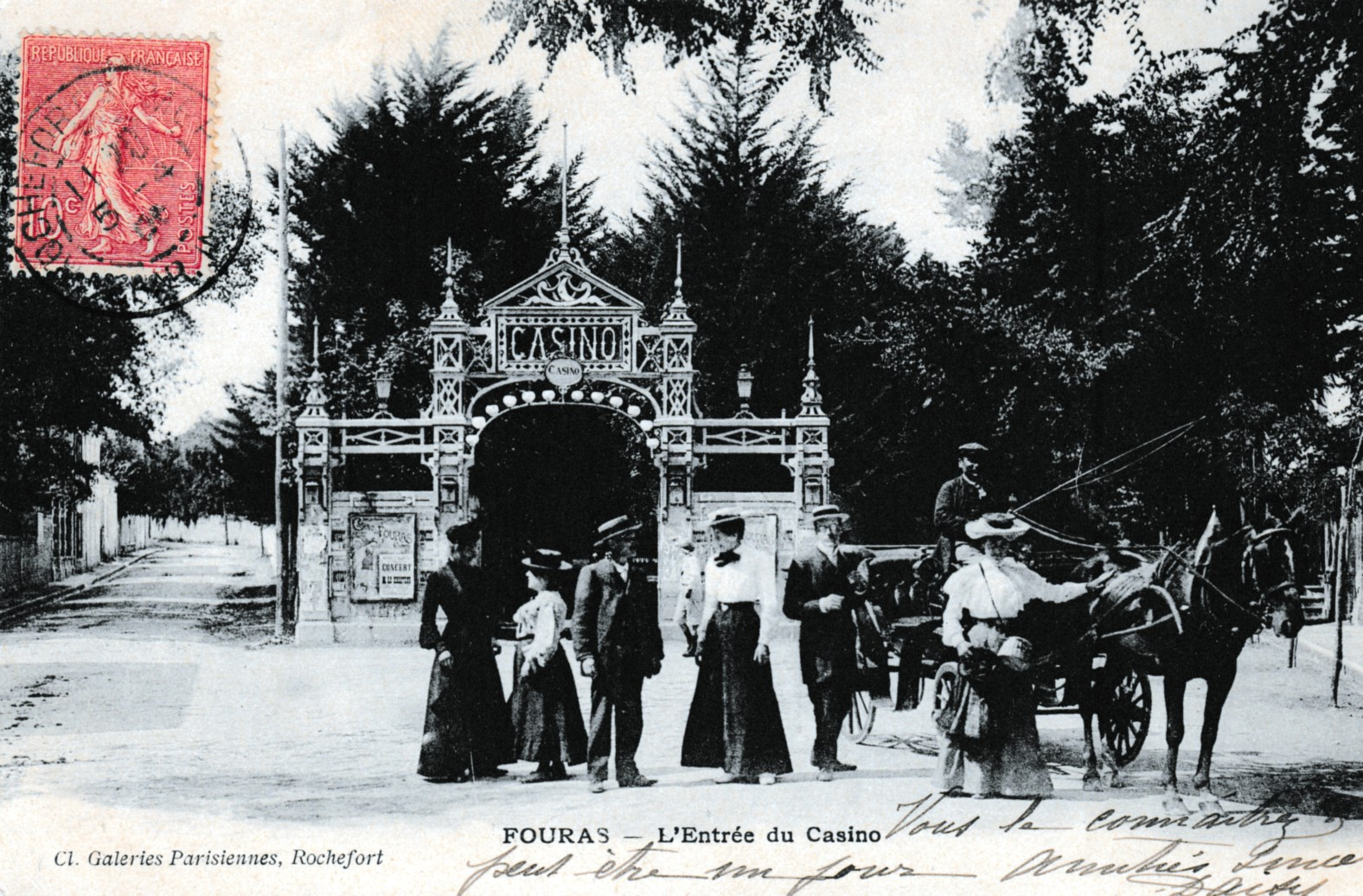 L'entrée du Casino de FOURAS en 1905